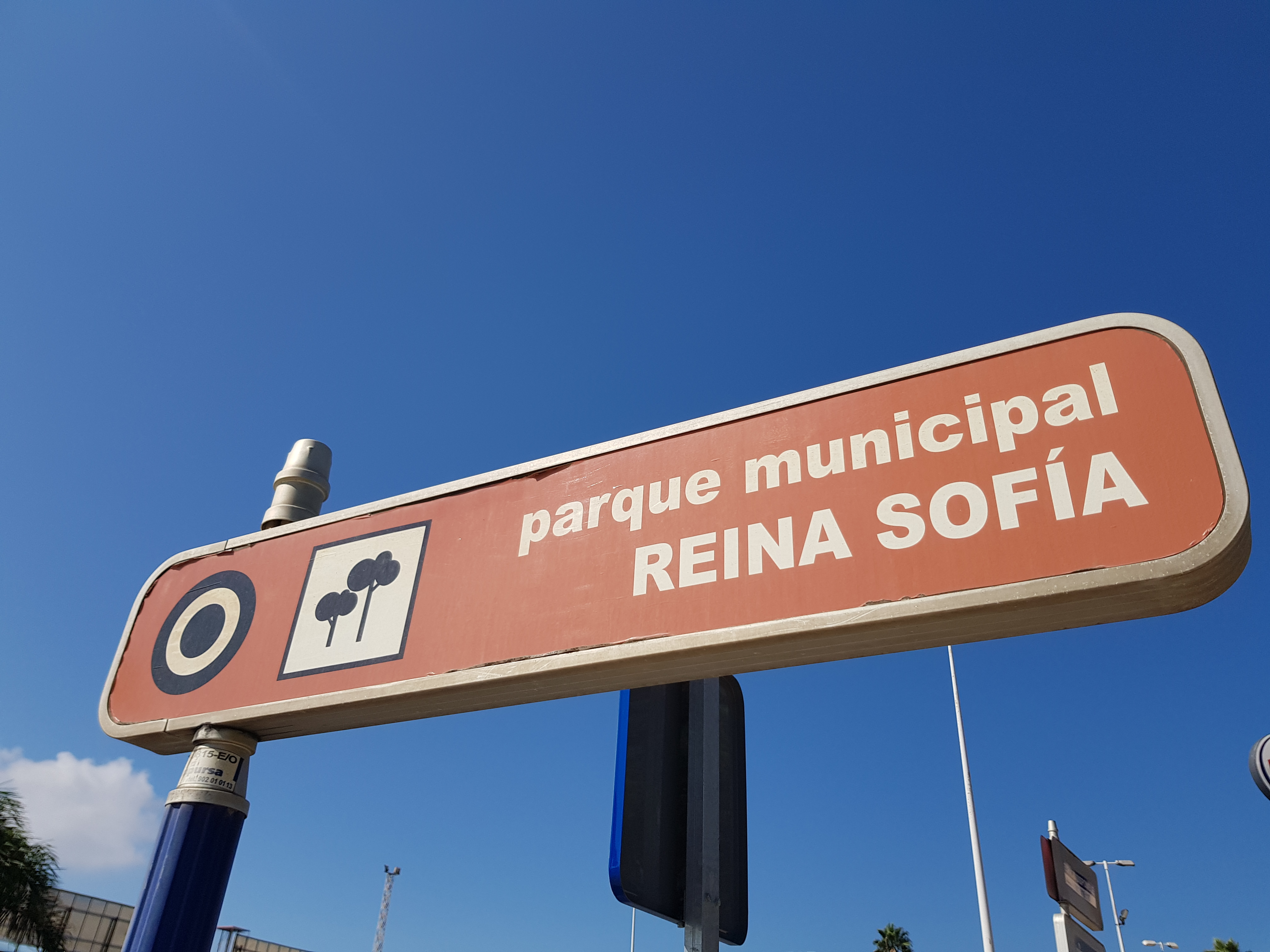 parque municipal reina sofia